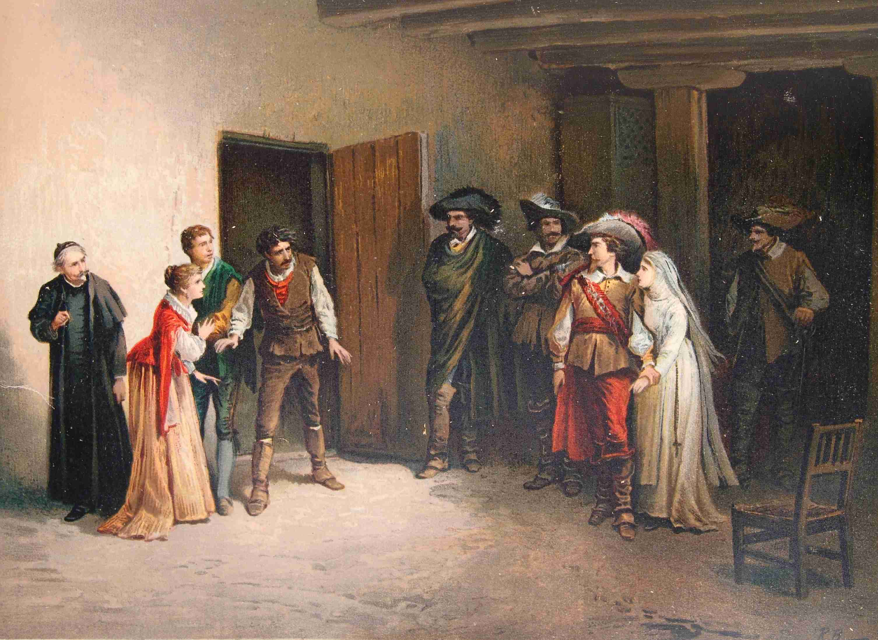 202_093_quijote_cap36